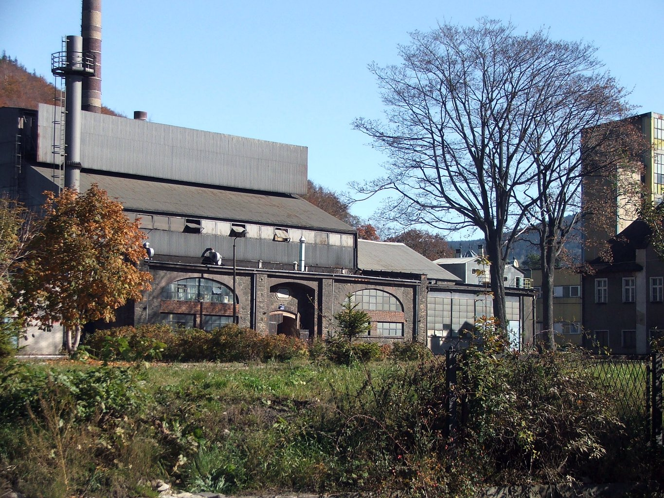 Najstarsze zabudowania HSK "Violetta" w Stroniu Śląskim (Dolny Śląsk, powiat kłodzki)